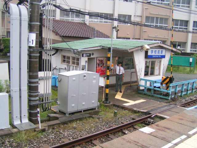 学校前駅 投稿者が撮影(2006/08/29)